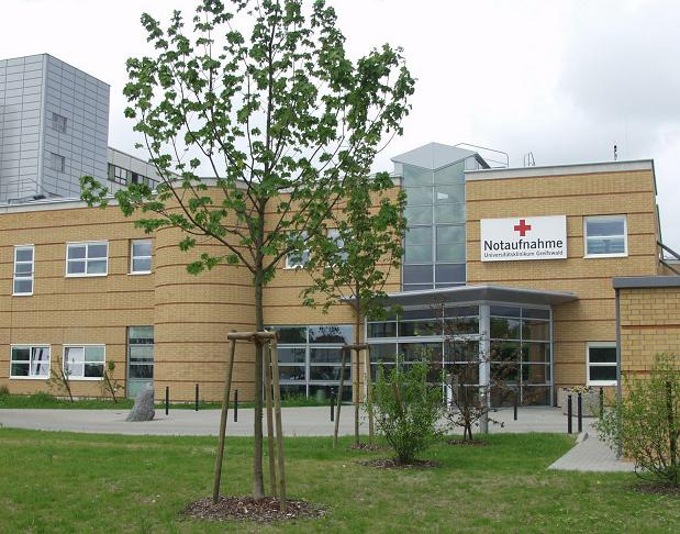 Der Eingang zur Notaufnahme des Universitätsklinikum Greifswald